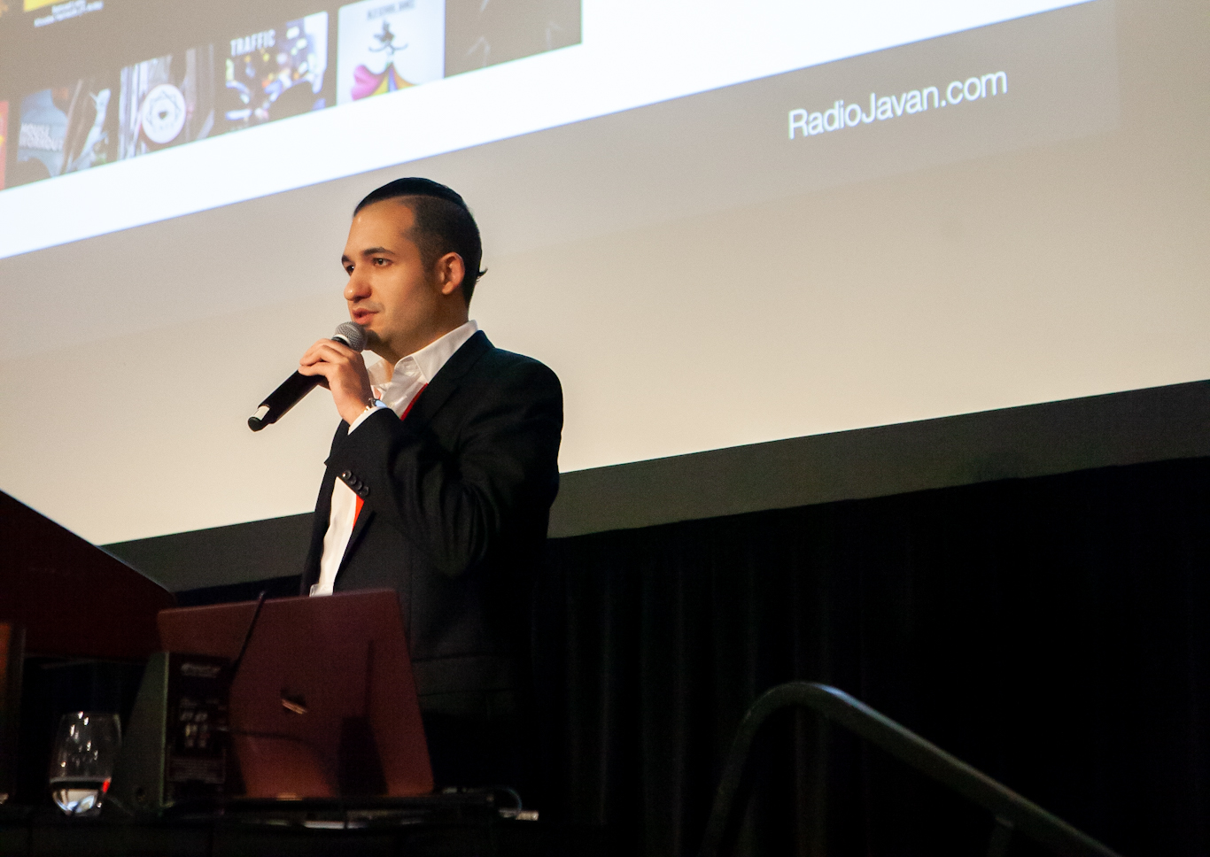 این عکس توسط پوریا افخمی در شهر تورنتو ثبت شده است